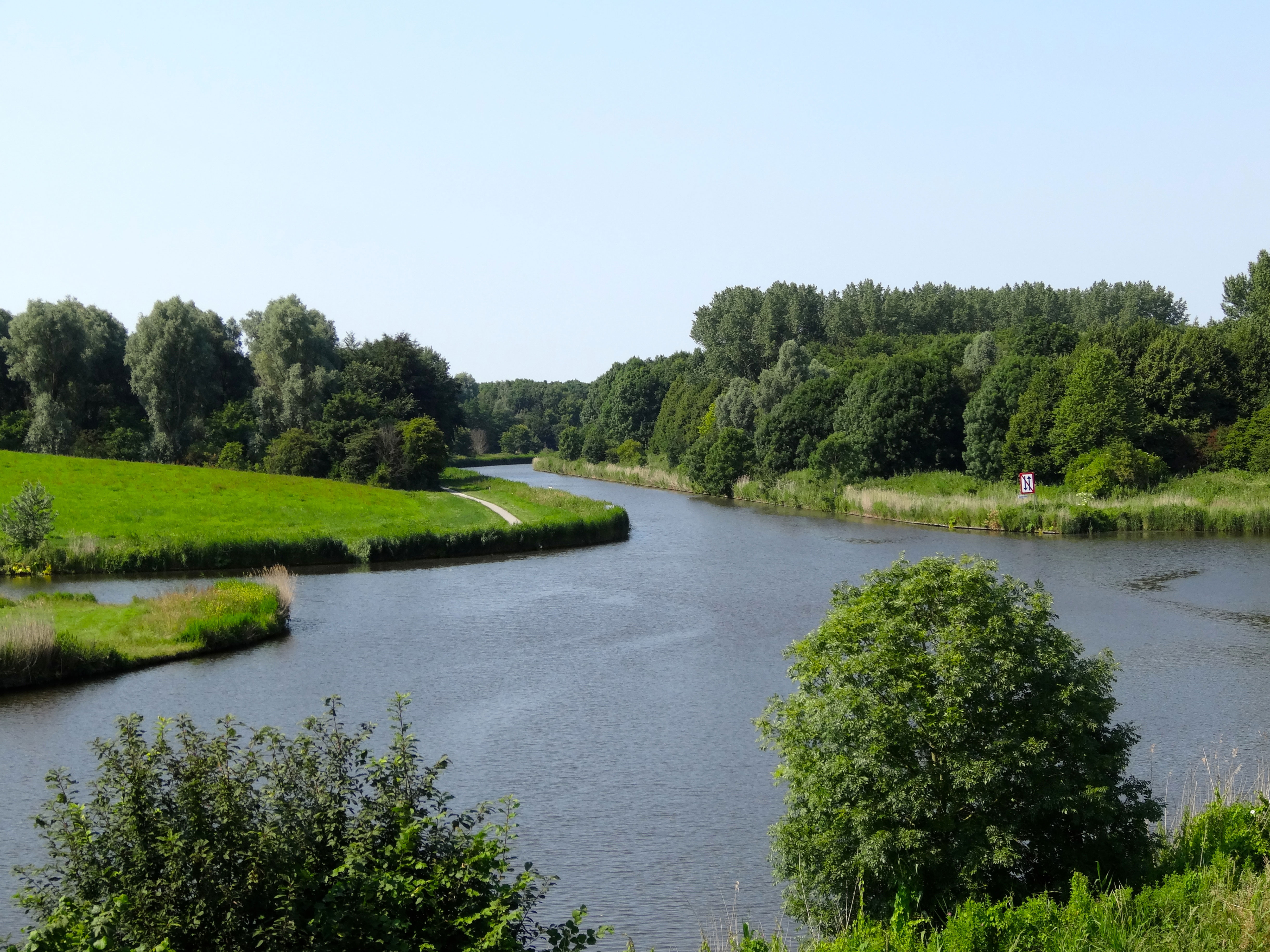 Van links naar rechts de Lage Vaart met links in het midden het Geldersdiep en in het midden naar achter de Oostervaart